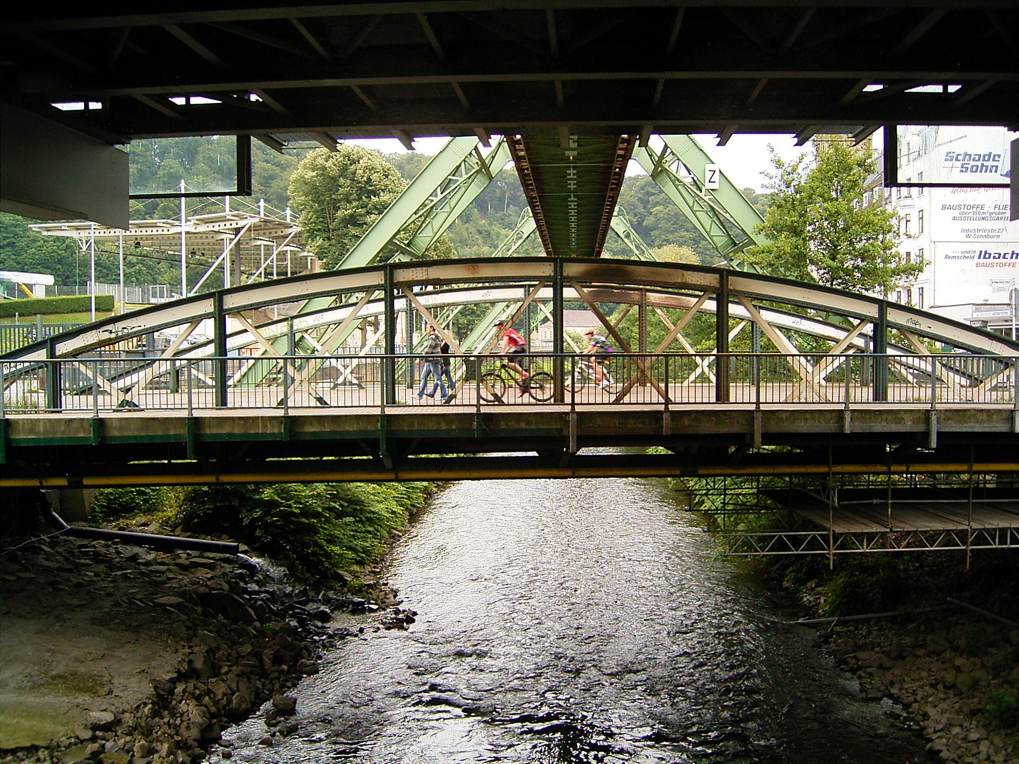 Alte Zoobrücke über die Wupper in Wuppertal